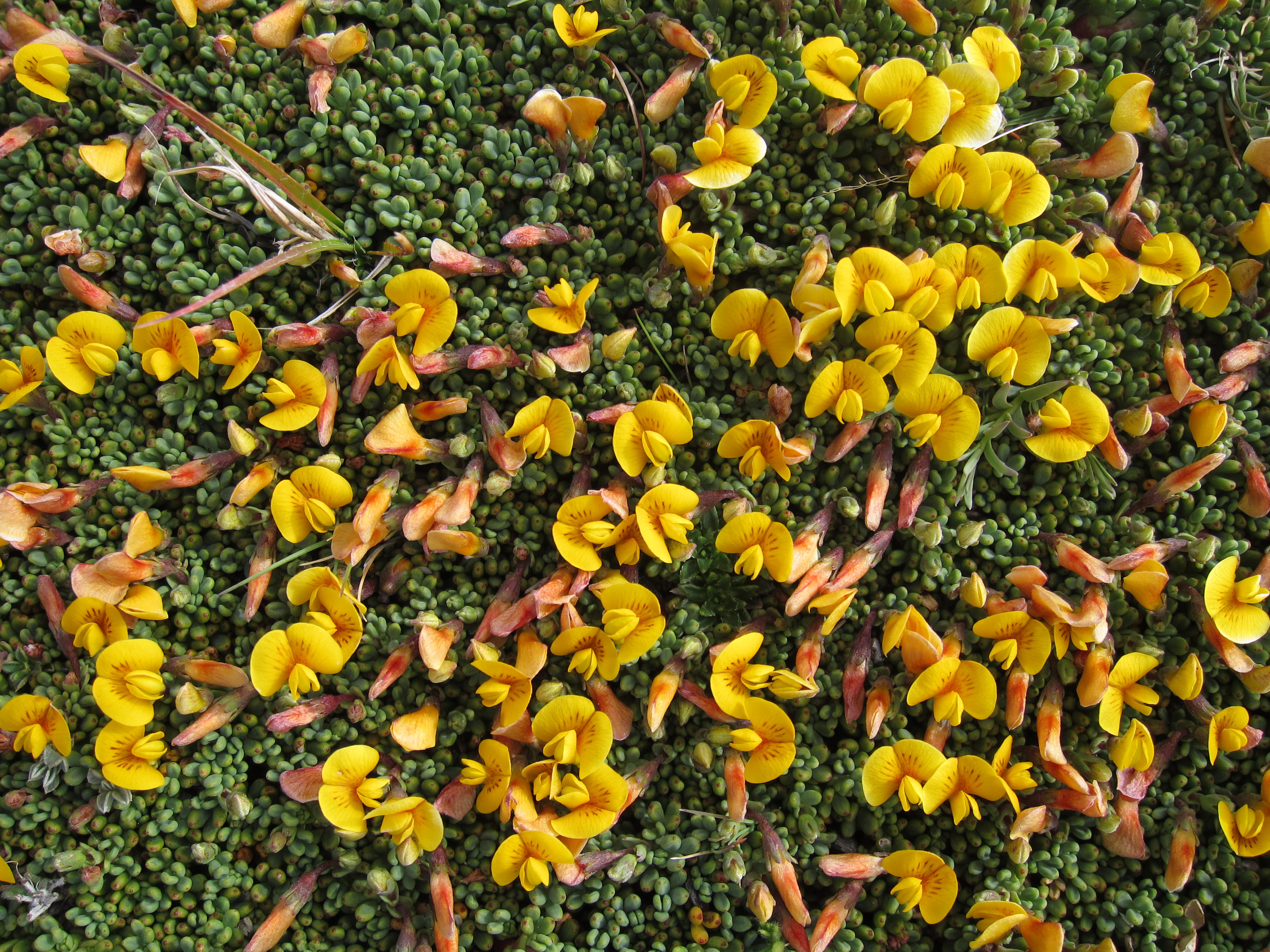 Adesmia salicornioides on Loma del Pliegue Tumbado in Parque Nacional Los Glaciares